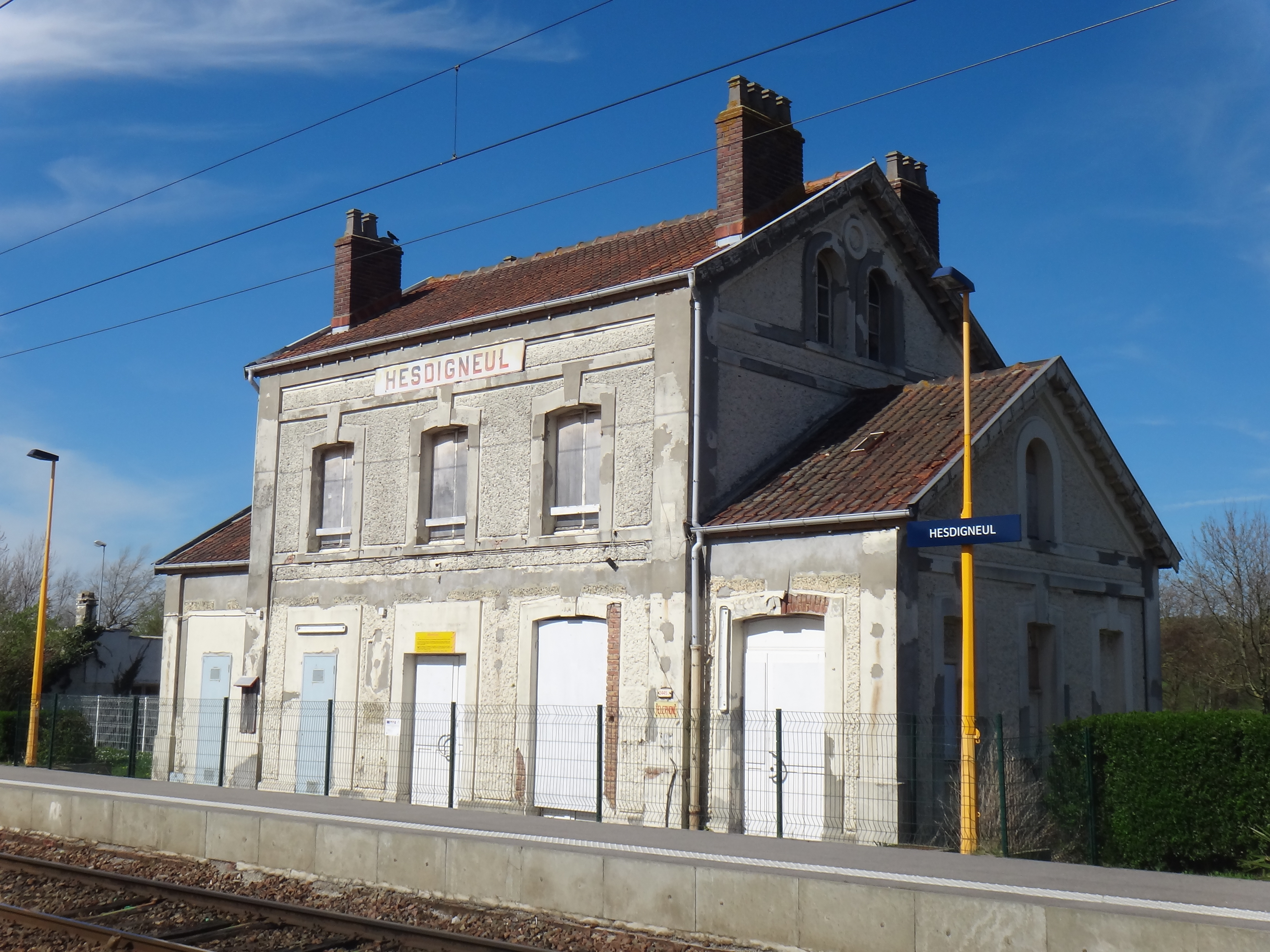 Gare de Hesdigneul, Pas-de-Calais, France, en 2014